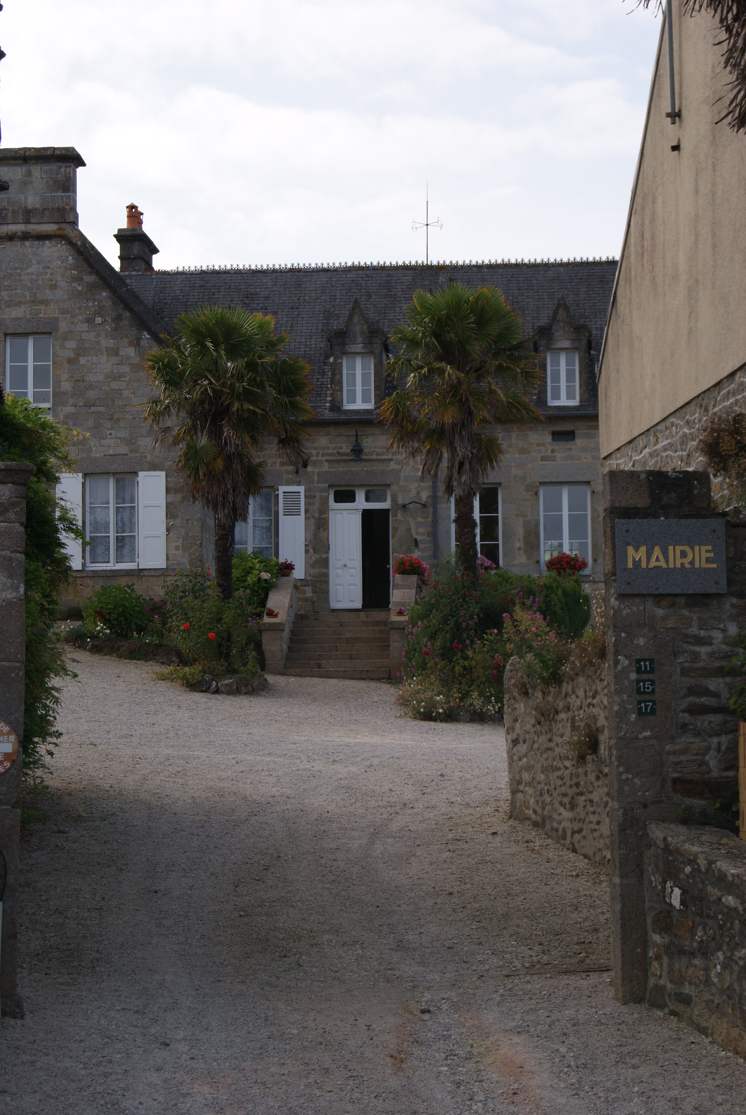 Mairie de la commune du Vast (Manche, France)